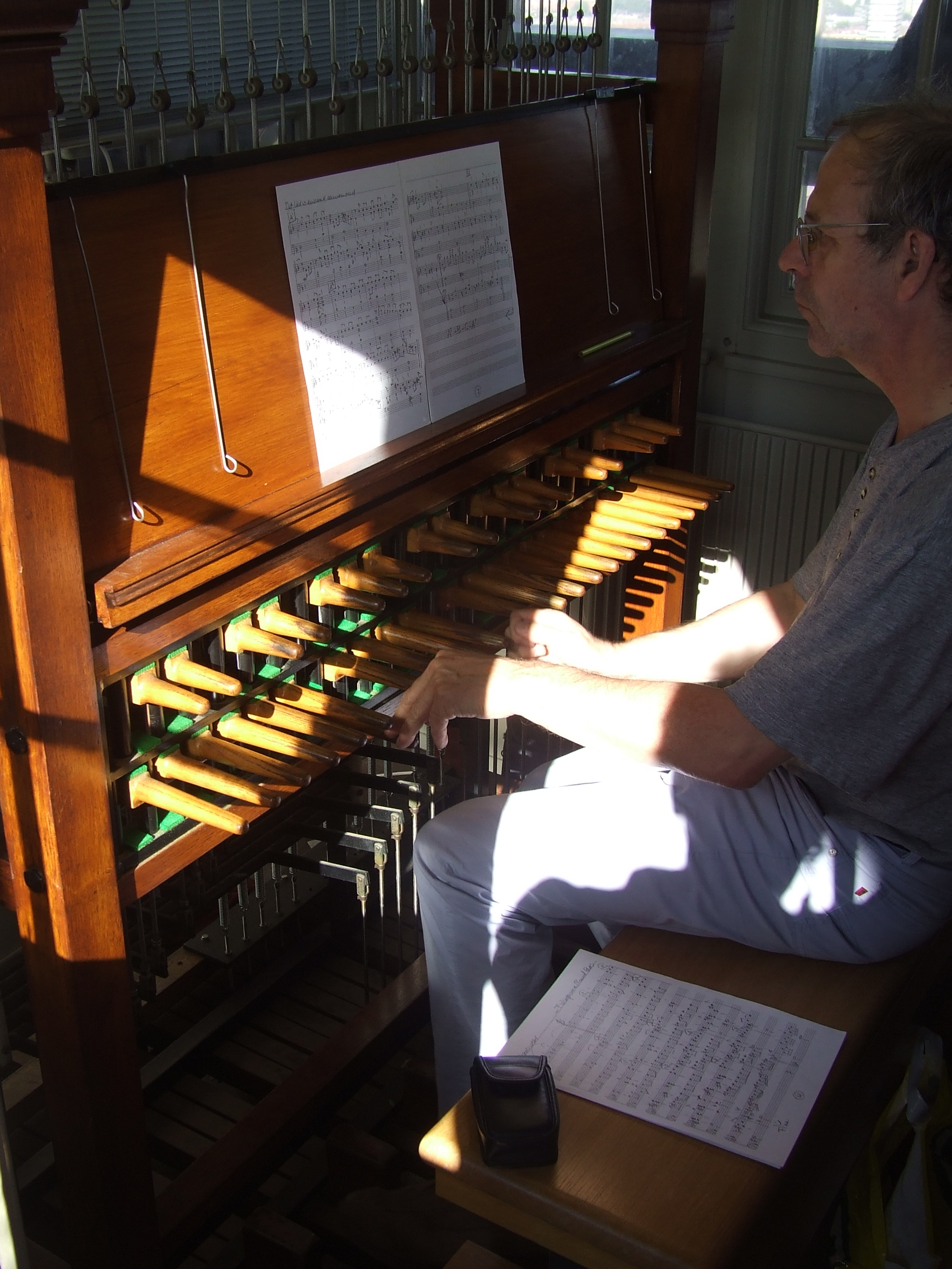 Arie Abbenes is de huidige beiaardier van de Domtoren in Utrecht. Op deze foto kun je hem zienm spelend achter het klavier van de beiaard. De foto is gemaakt door Paulus_2 1 okt 2006 22:39 (CEST) en is geheel vrij voor verspreiding